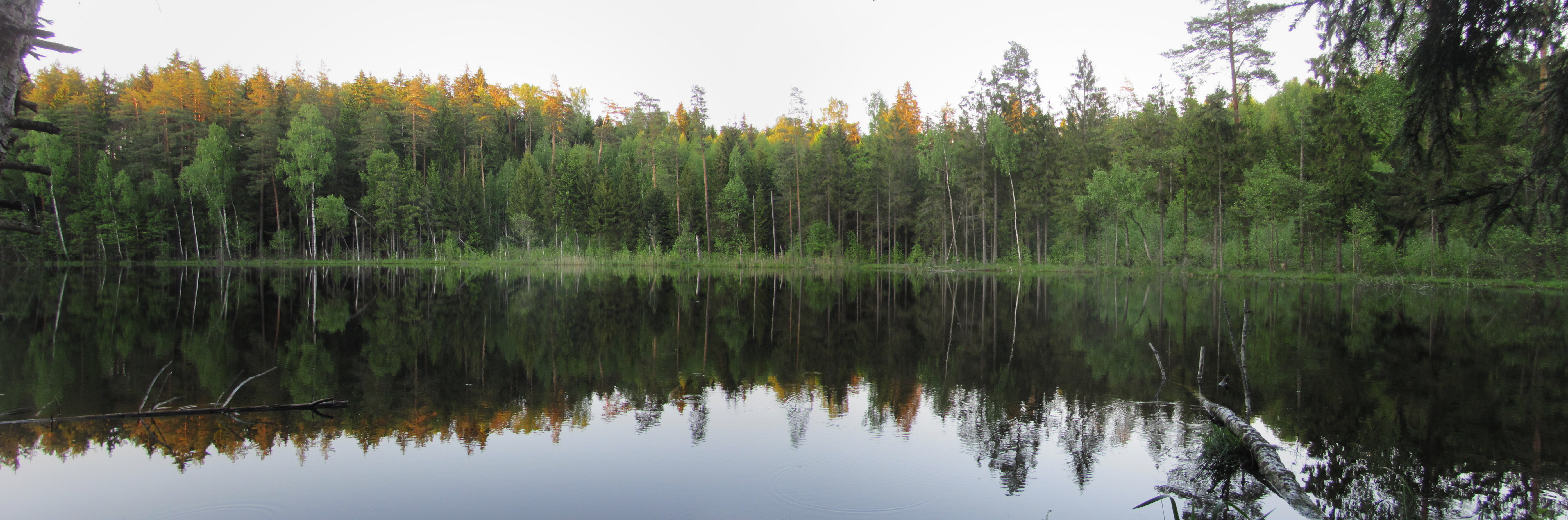 Degučių sen., Lithuania